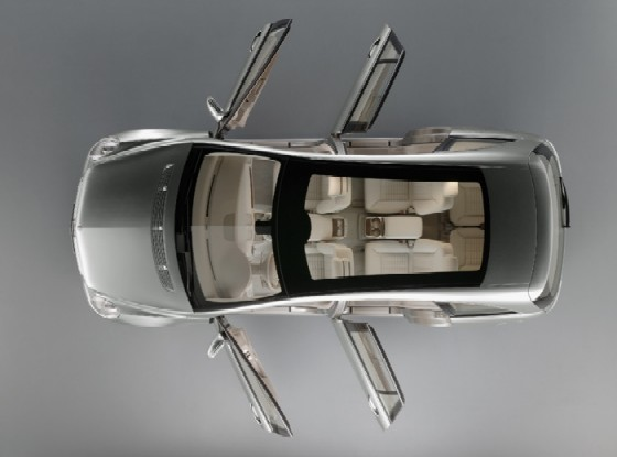 Vision R